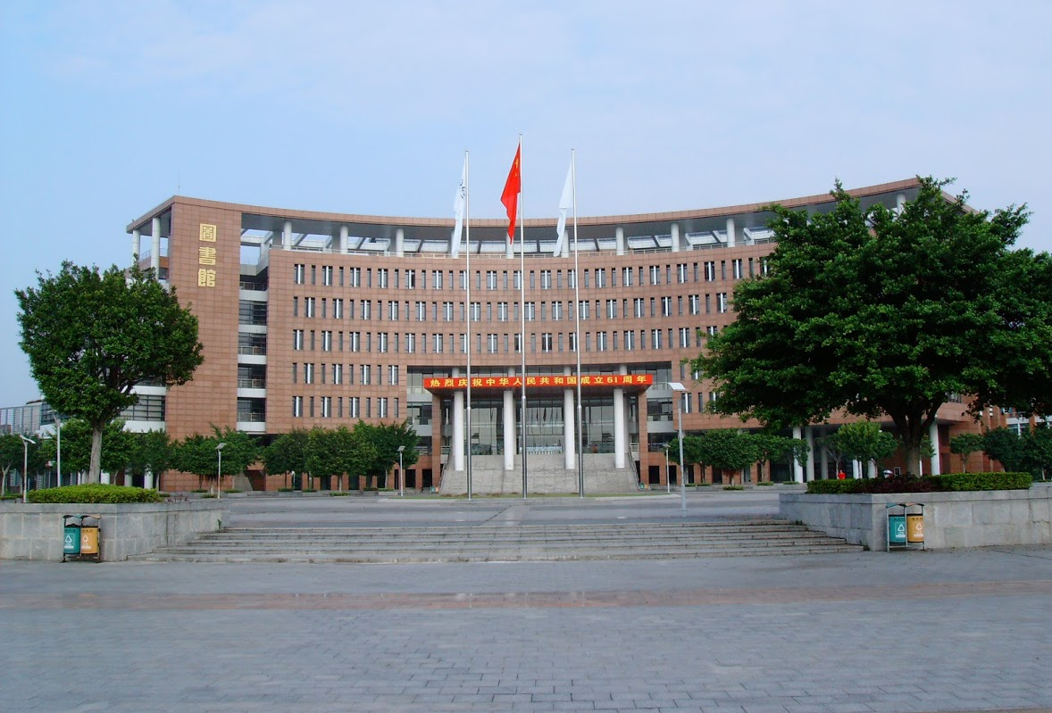 华南理工大学大学城校区图书馆